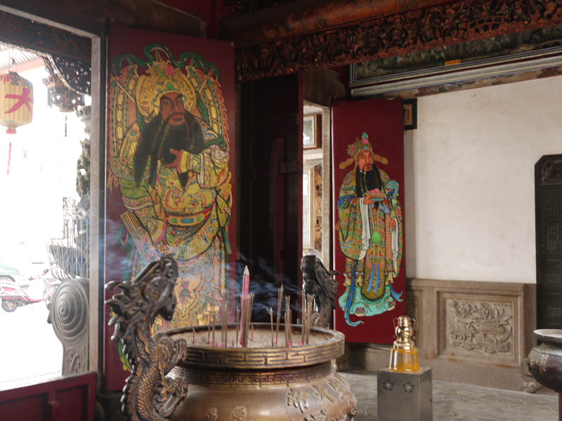 學甲慈濟宮門神Bân-lâm-gú: Ha̍k-kah Tsû-tsè-kiong mn̂g-sîn. 學甲慈濟宮門神